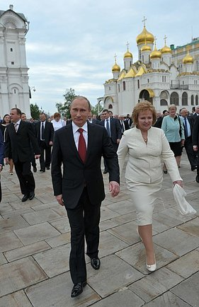 En la Plaza de Catedral en el Kremlin de Moscú después de la ceremonia de inauguración.